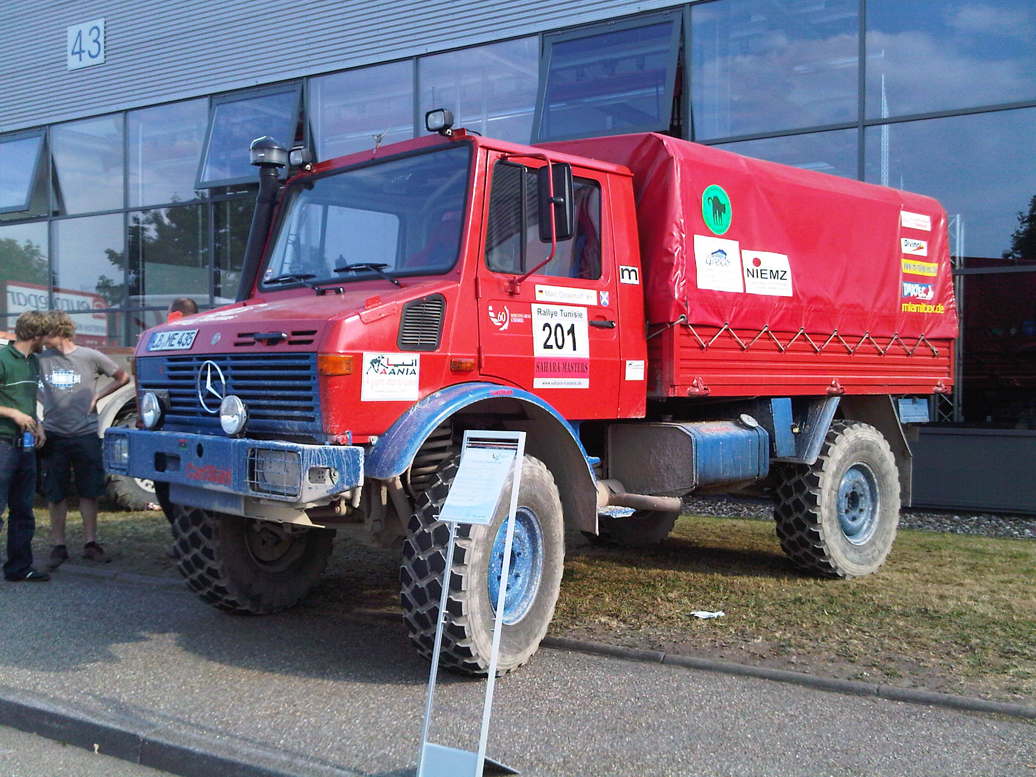 60 Jahre Unimog - Wörth 2011 057